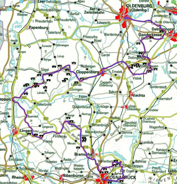 Verlauf der „Straße der Megalithkultur“